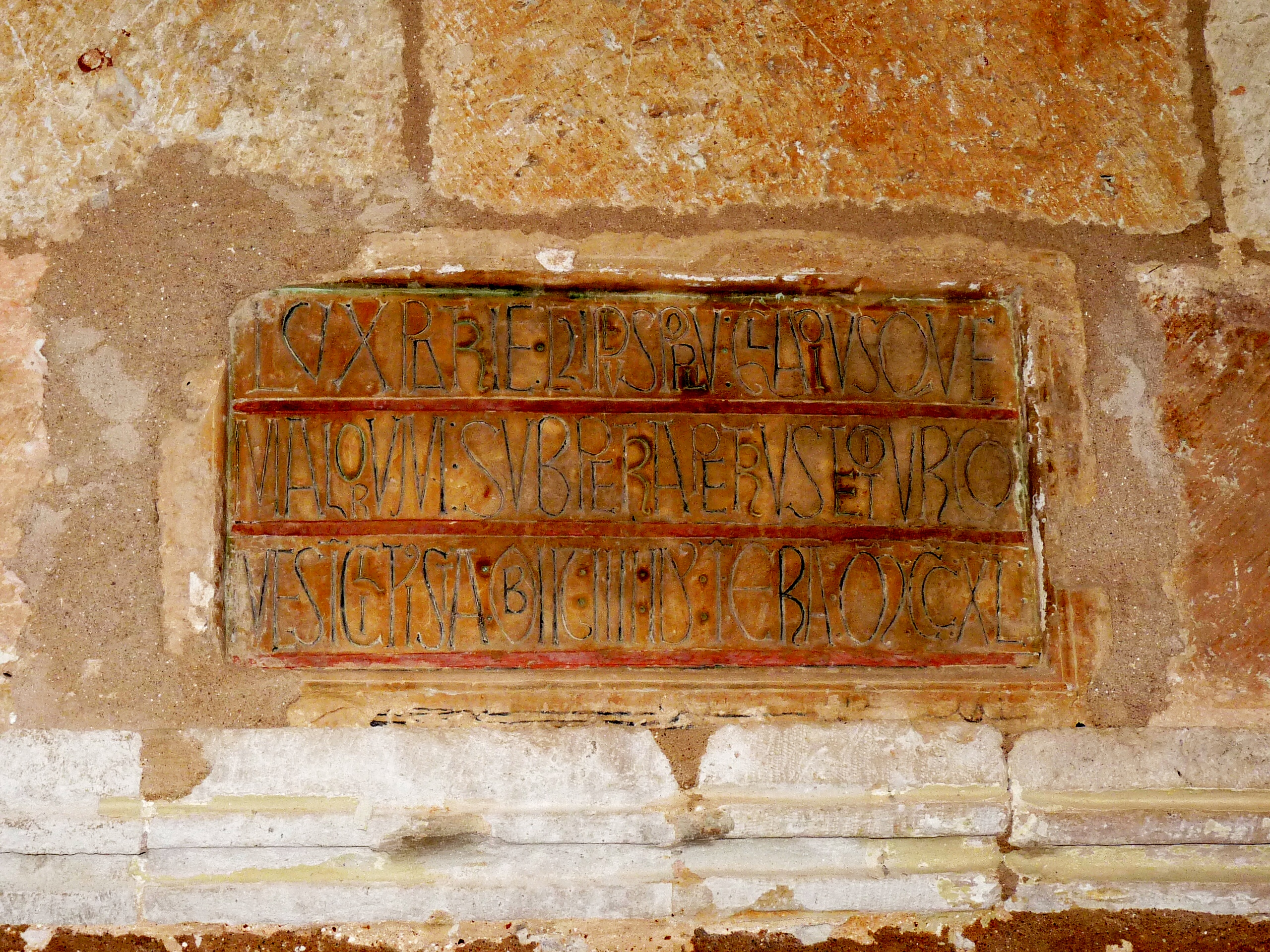 Monasterio de Santa María de Huerta - Claustro gótico - Panteón de los Señores de Molina - Inscripción dedicada a Don Pedro Manrique, II señor de Molina: "LUX PATRIAE CLIPEUS POPULI GLADIUSQUE MALORUM SUB PETRA PETRUS TEGITUR COMES INCLITUS ISTA. OBIIT IIII IDUS I (JANUARII) ERA MCCXL" (año 1202)